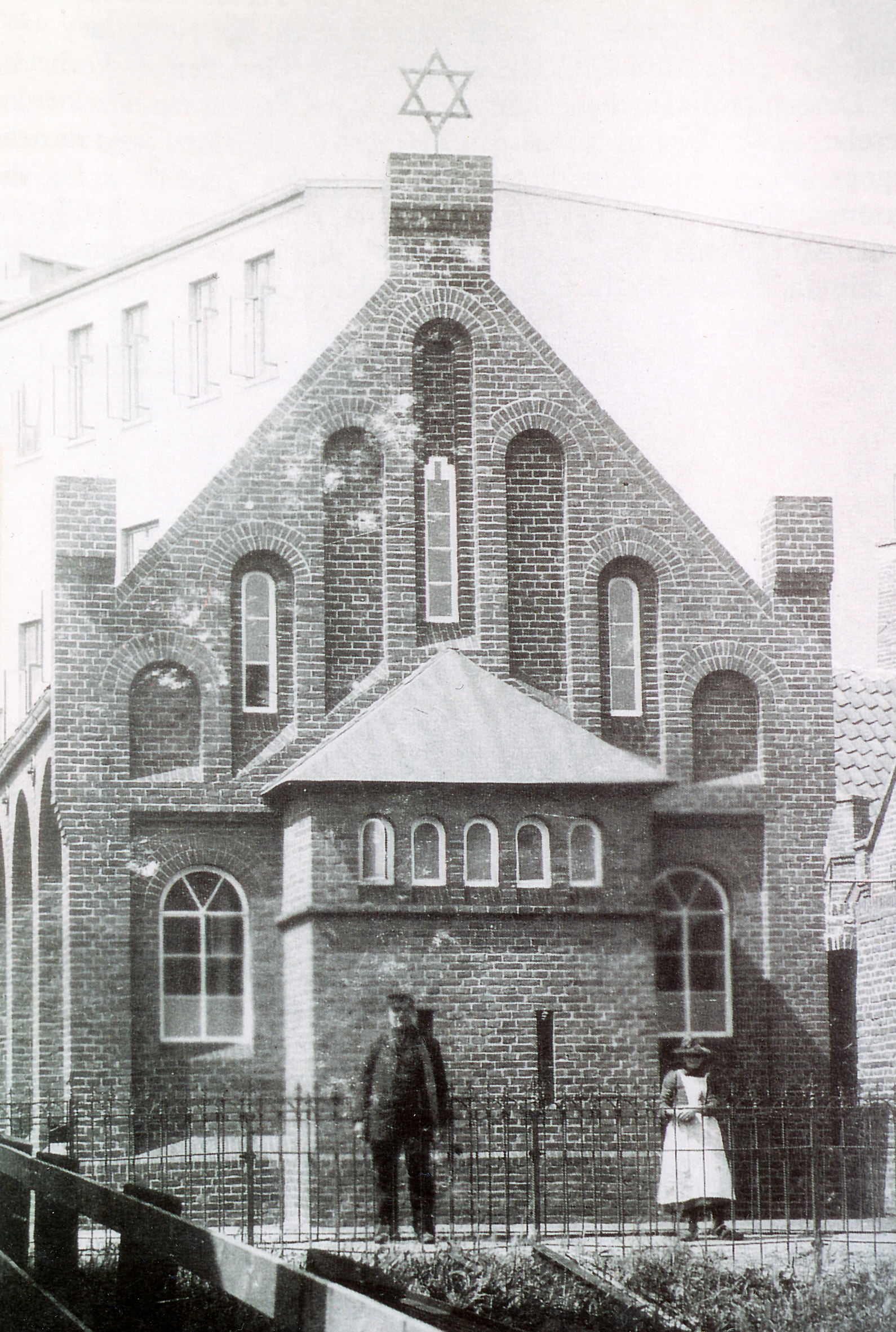 Synagoge Norderney, Aufnahme 1904